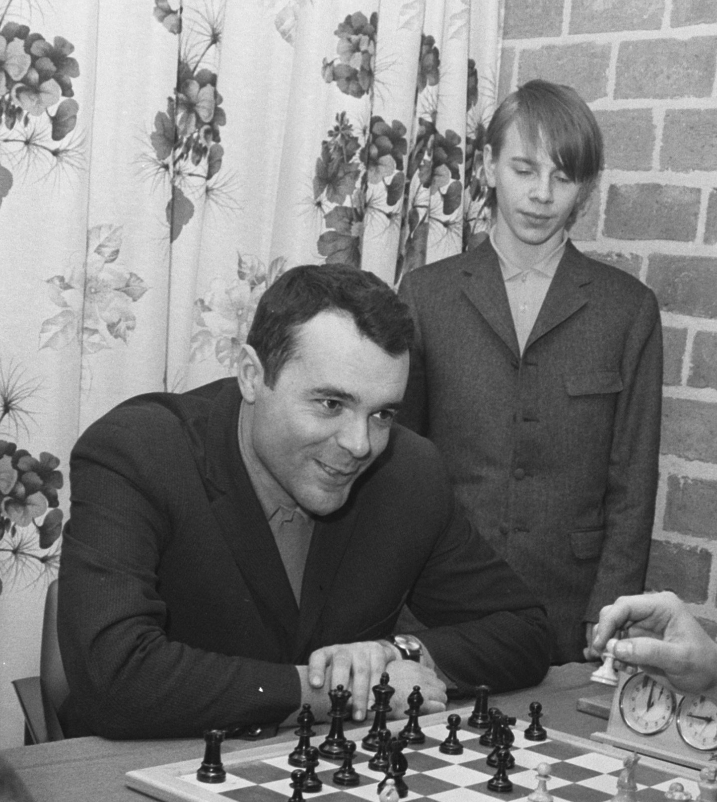 32e Hoogoven Schaaktoernooi in Hotel Kennemerduin te Wijk aan Zee 1970, Platonov en Andersson.